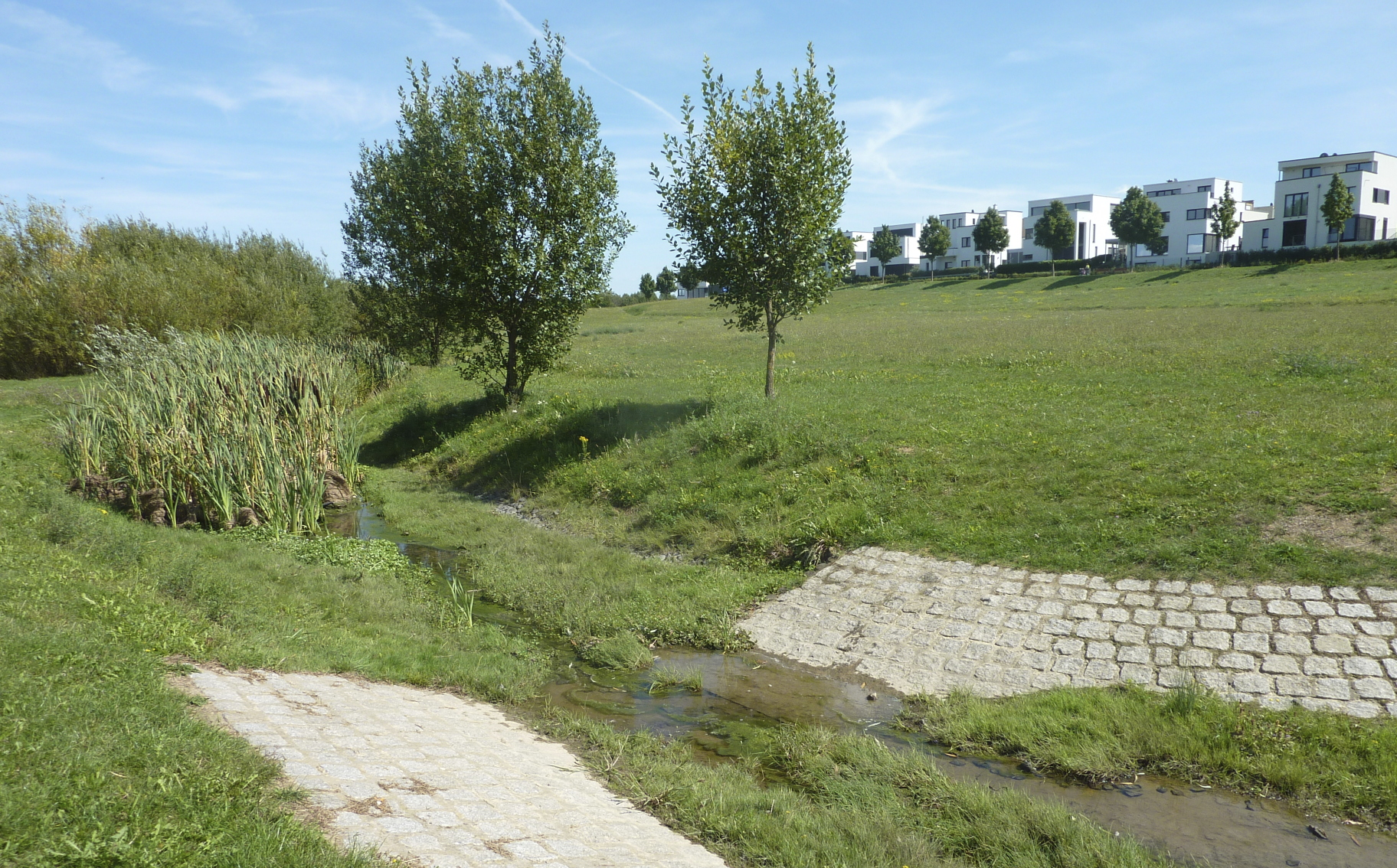 Der Kätcheslachpark ist eine Grünanlage im Stadtteil Kalbach-Riedberg der Stadt Frankfurt am Main. Der Park mit zentralem Teich, Regenwasser-Rückhaltebecken sowie mehreren Zu- und Ablaufgräben wurde von 2006 bis 2007 in einer Mulde der Anhöhe Riedberg angelegt. Sein Hauptzweck ist die Gewässerregulierung der benachbarten, zur selben Zeit neu angelegten Wohnsiedlung. Das Foto zeigt einen der Wassergräben, die das Rückhaltebecken aus westlicher und südlicher Richtung mit Regenwasser speisen. Oben rechts im Bild Wohnhaus-Neubauten der Siedlung Riedberg. Blick nach Osten.